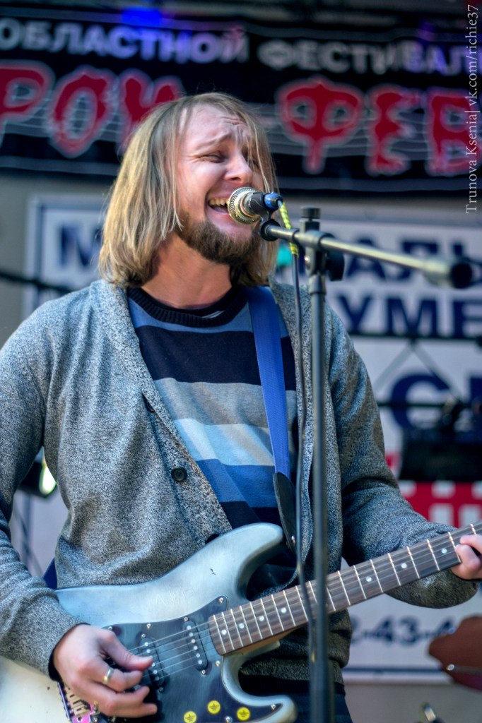 Грандж группа "ПУСТЬ ПРИДУТ КЛОУНЫ" образовалась осенью 1998 года в г.Иваново. Когда пришло время встретиться трём придуркам с общими интересами.